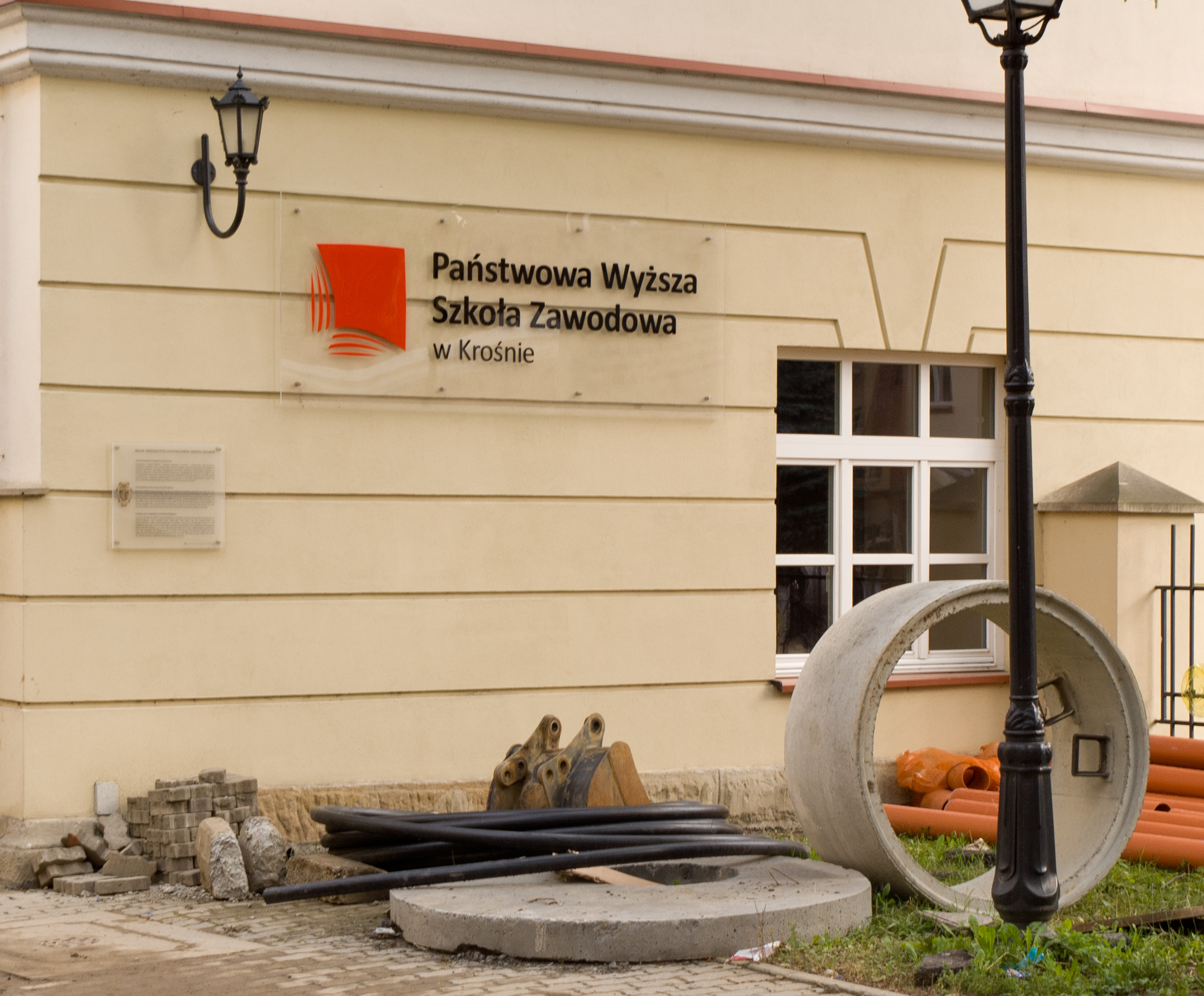 Państwowa Wyższa Szkoła Zawodowa przy ul. Kazimierza Wielkiego w Krośnie